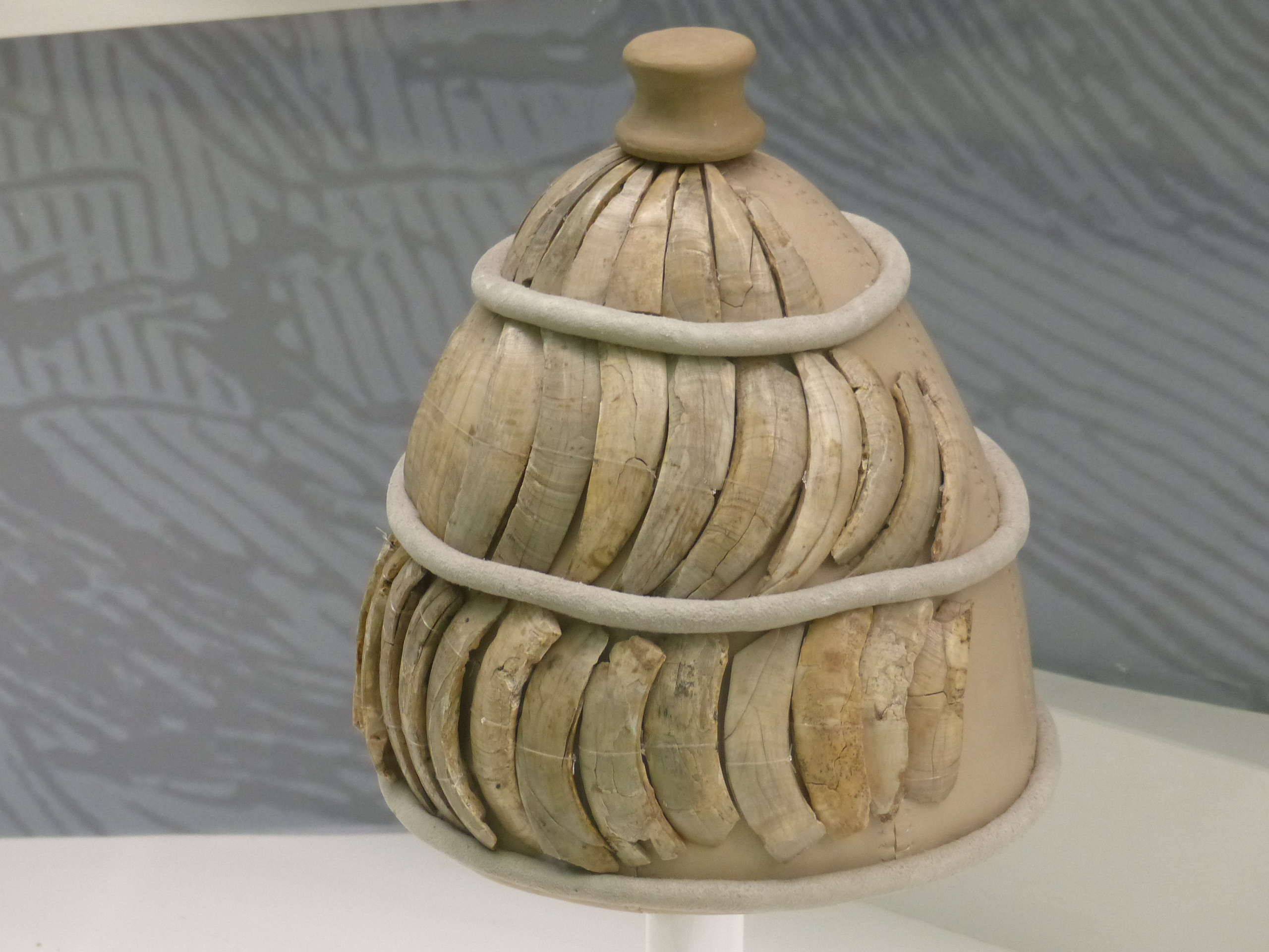 Le Louvre-Lens : Exposition Homère 2019Casque à dents de sanglier14e siècle ou 13e siècle avant JCProvient de la tombe à chambre de Spata (Grèce), collectop, du Musée national archéologique d'Athène (EAM ∏ 2097-2098)